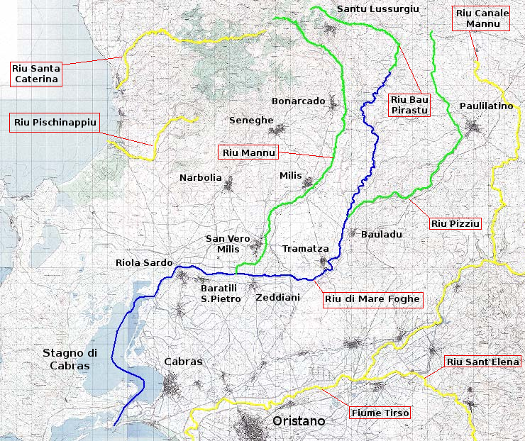 Reticolo idrografico del Riu di Mare Foghe